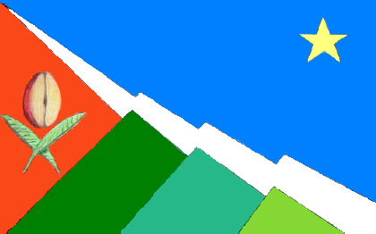 Bandera del municipio Juan Vicente Campo Elías. Estado Trujillo. Venezuela